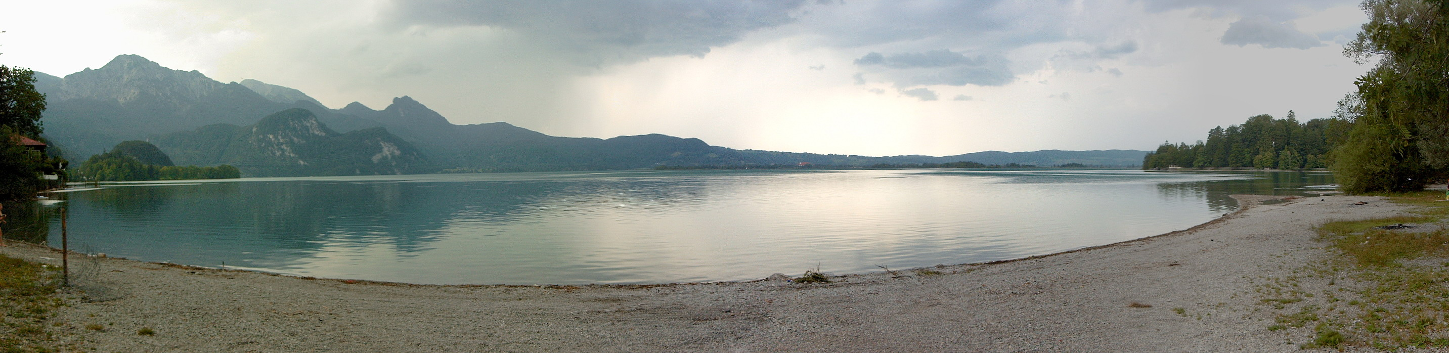 Panorama Kochelsee